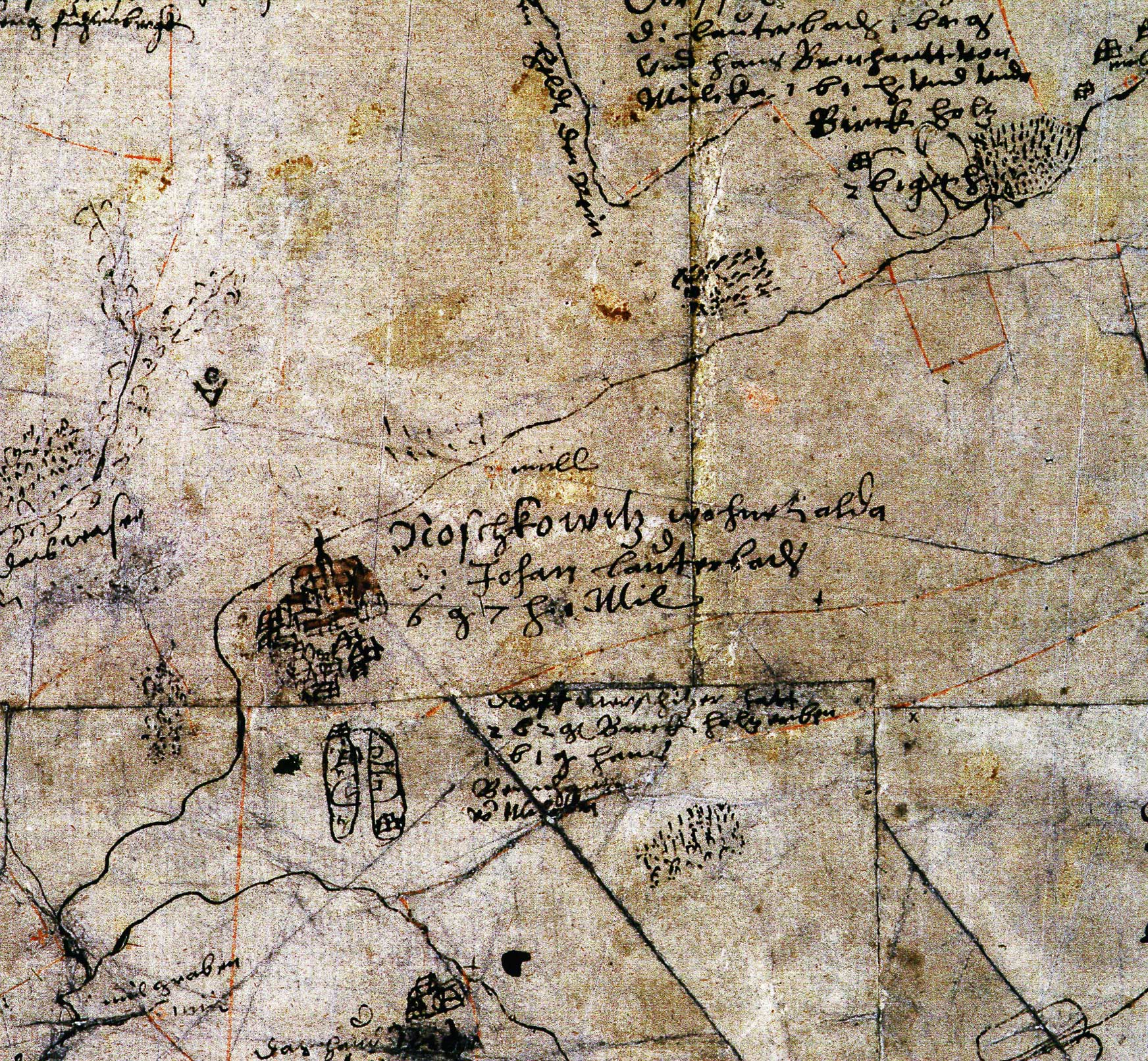 fototechnische Auszugsvergrößerung - Staatsarchiv Dresden Blatt 229 um 1590